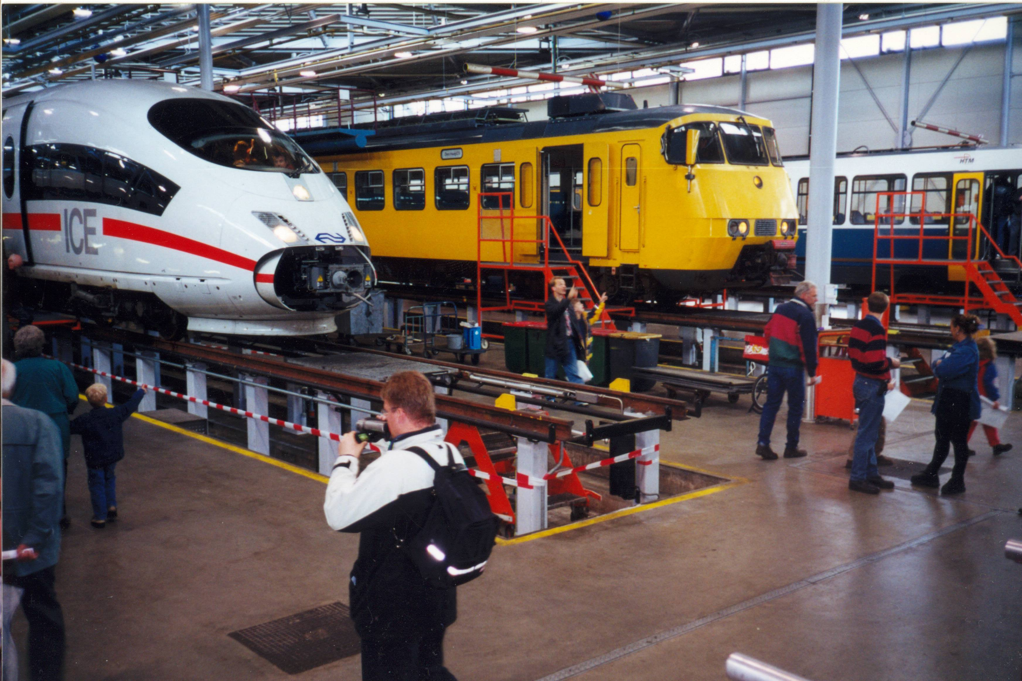 Trains_Nederlandse Spoorwegen